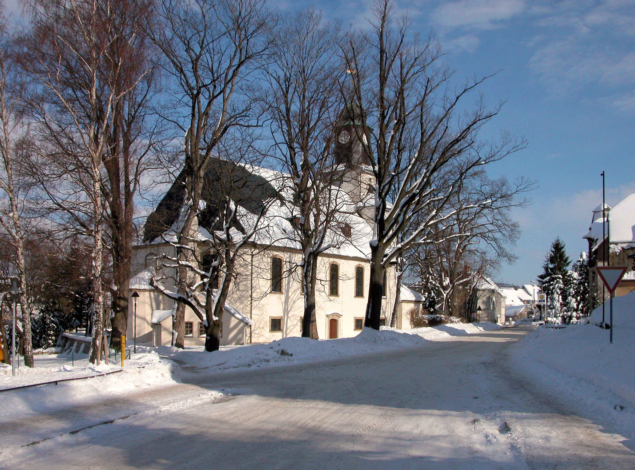 08.02.2005 09517 Zöblitz, Am Marktplatz (GMP: 50.657349,13.231239): Evangelische Kirche, Barockbau, 1729 von Johann Christian Simon aus Dresden. [DSCN5910.TIF]20050208500DR.JPG/Blobelt